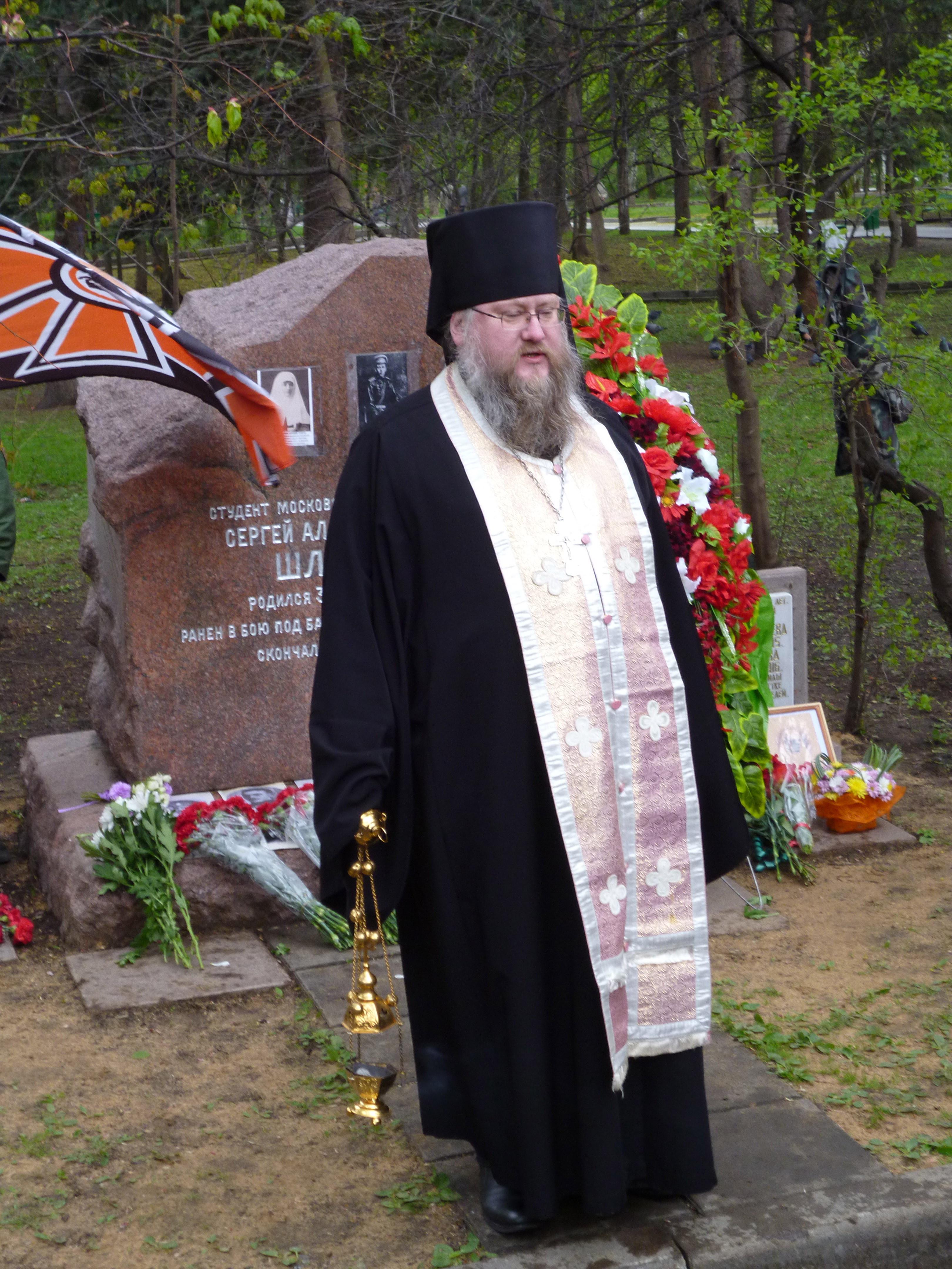 Церемония открытия памятной плиты "Сёстрам милосердия" Ольге Шишмарёвой и Вере Семёновой, погребённым на Братском кладбище у могилы студента Московского университета Сергея Шлихтера, погибшего под Барановичами в 1916 году.